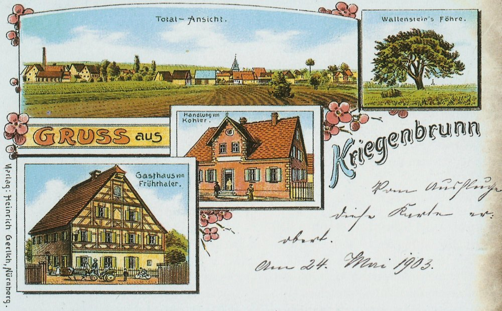 Kriegenbrunn, heute Stadtteil von Erlangen